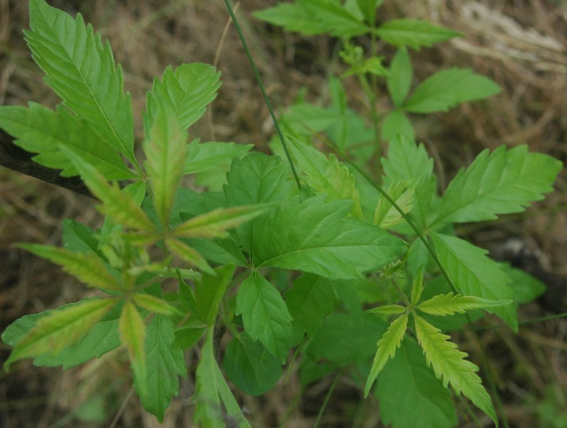 Vitex negundo